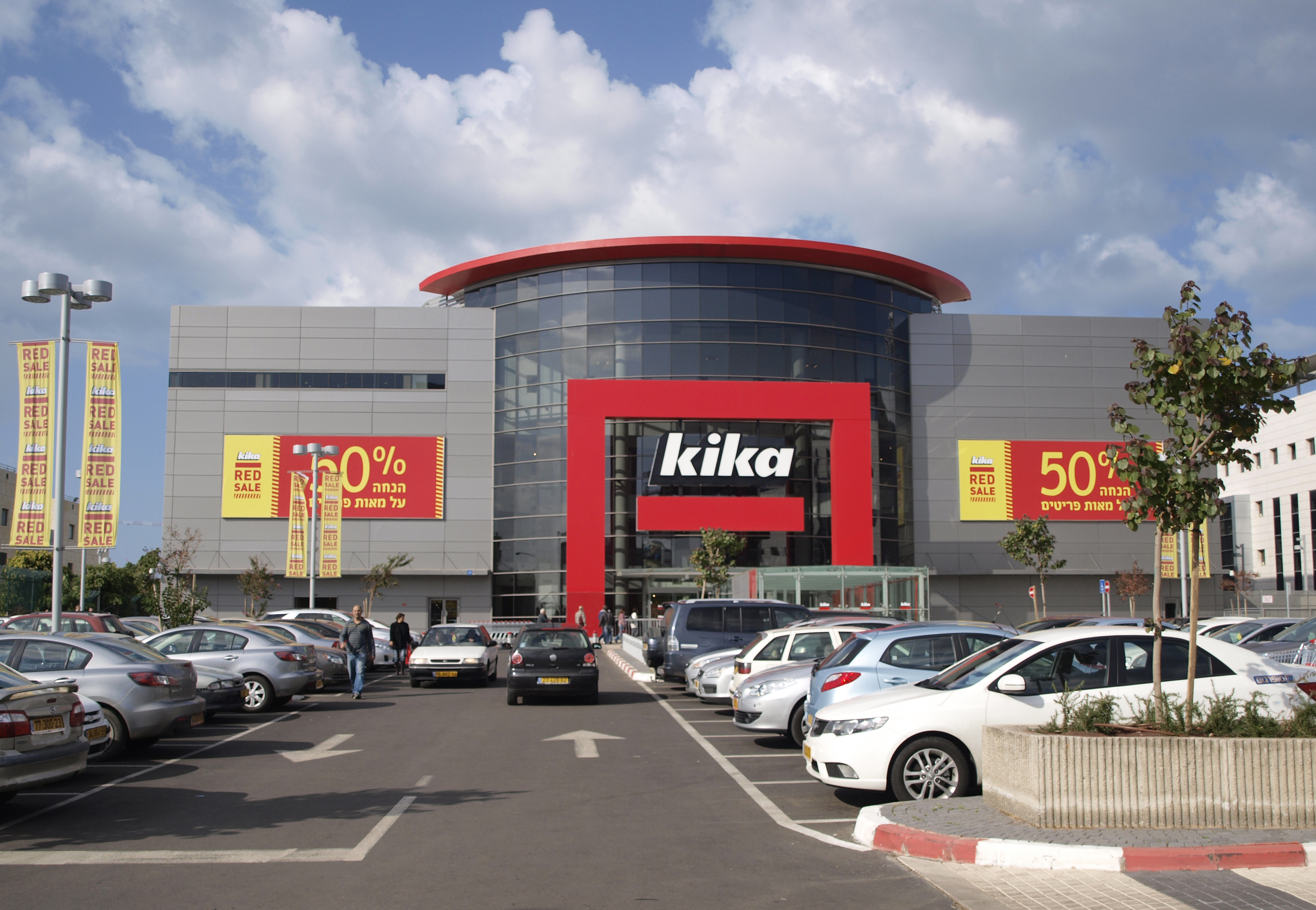 Kika store, Netanya, Israel